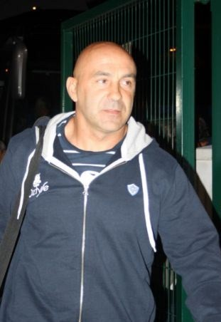 Laurent Travers, l'entraîneur des avants du club rugby à XV Castres olympique.